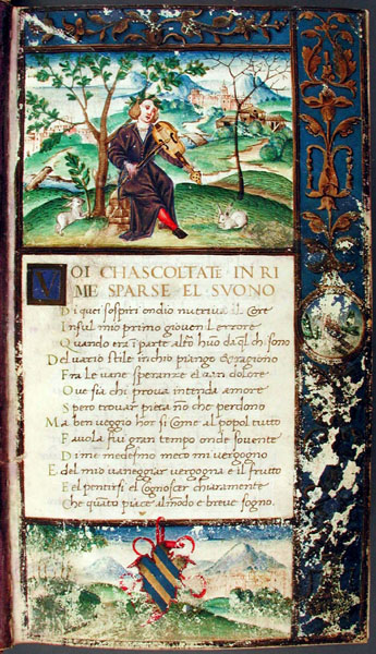 Museo Petrarchesco Piccolomineo, Triesete PETR. ms. I 12, c. 1r. Francesco Petrarca, Rime Membr.; sec. XV ex.-XVI inc. [Venezia]; cm 21,5x12,2